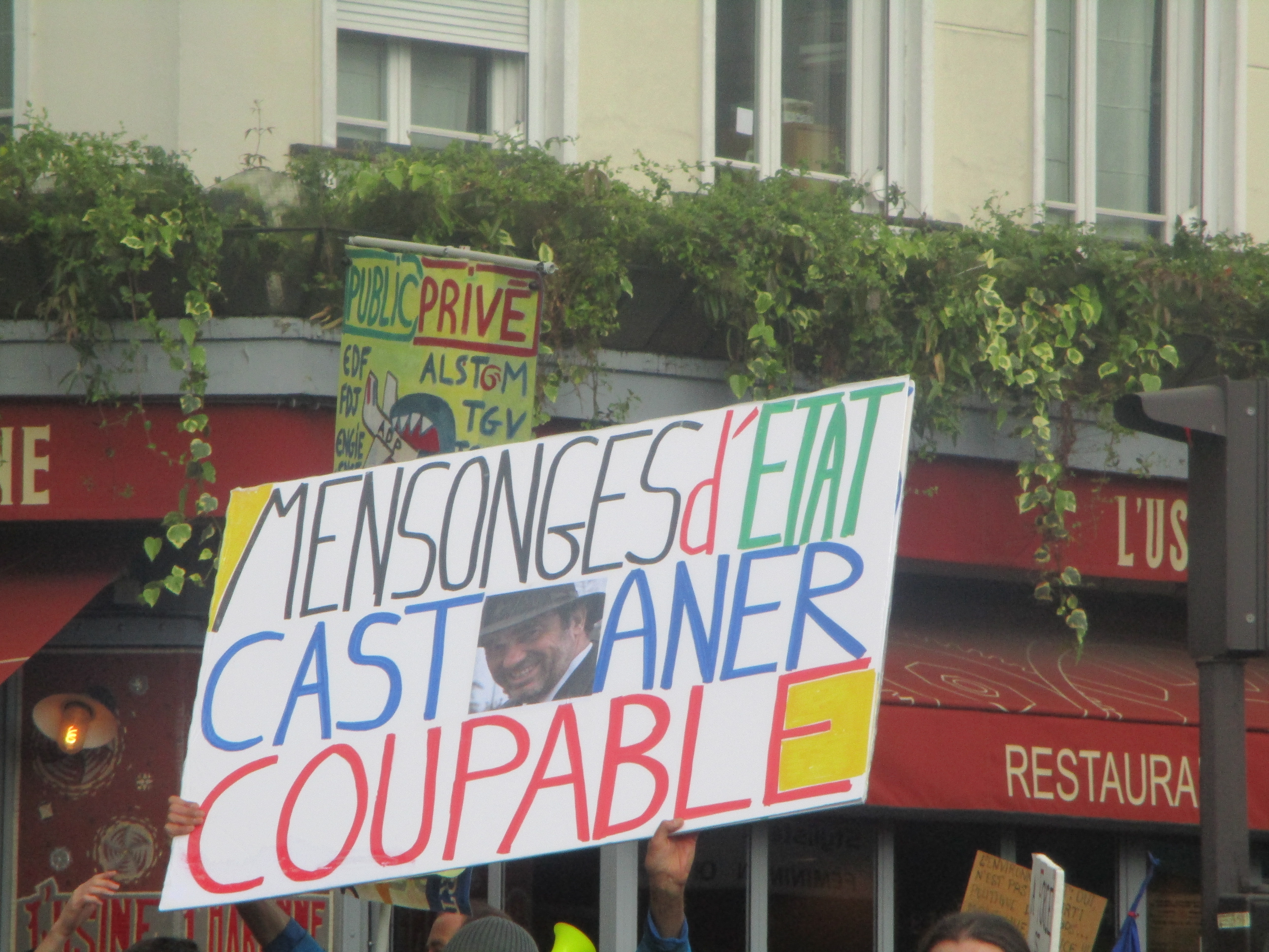 Manifestation des gilets jaunes à Paris, le 4 mai 2019.